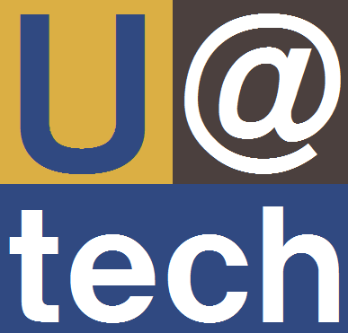 在来線技術試験車「U@tech」ロゴ